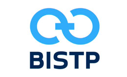 Logo de la Banco Internacional de São Tomé e Príncipe.